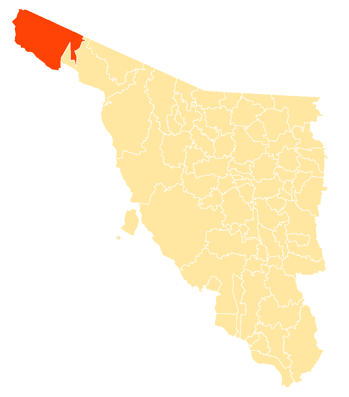 Municipio de Sonora, México.